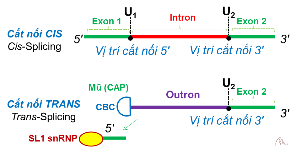 Outron hình thành qua xử lý ARN phương thức cắt nối trans (Trans-Splicing).